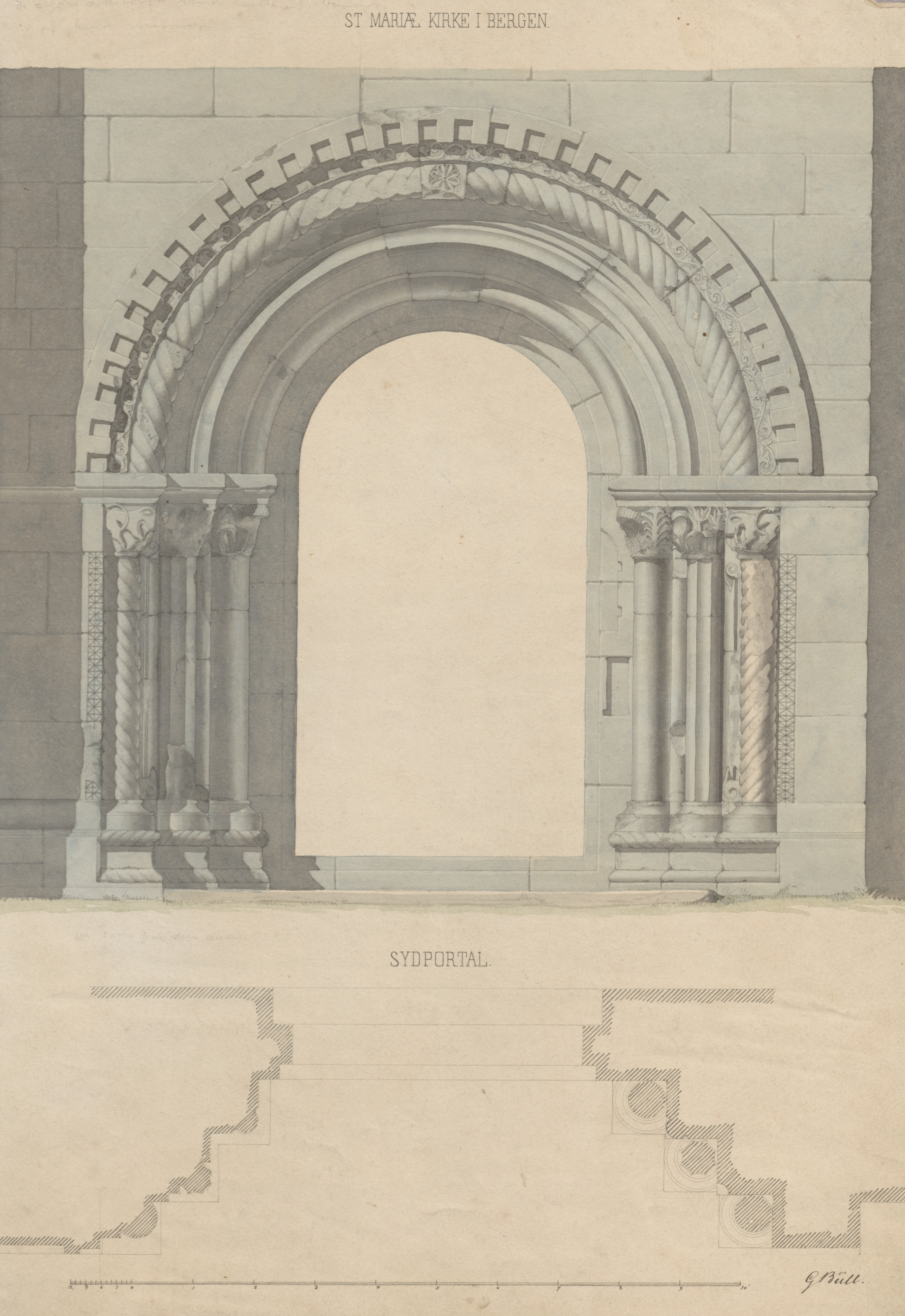 Bildet er hentet fra Riksantikvaren. Sydportal (FF kat.nr. 257) Eier : Fortidsminneforeningen Sted : Norway, Hordaland, Bergen Emneord: "MIDDELALDER, STEINKIRKER, PORTALER" Medium : "Tusj;Akvarell"